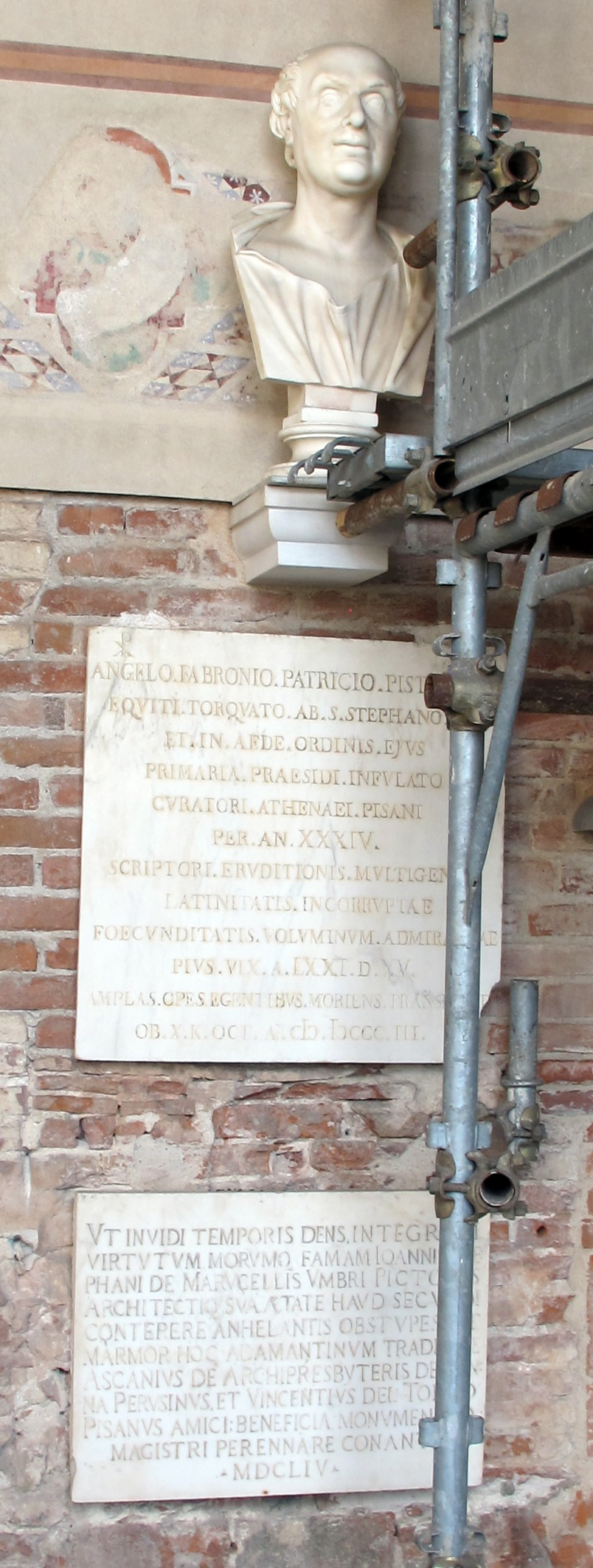 Monumento ad angelo fabbroni